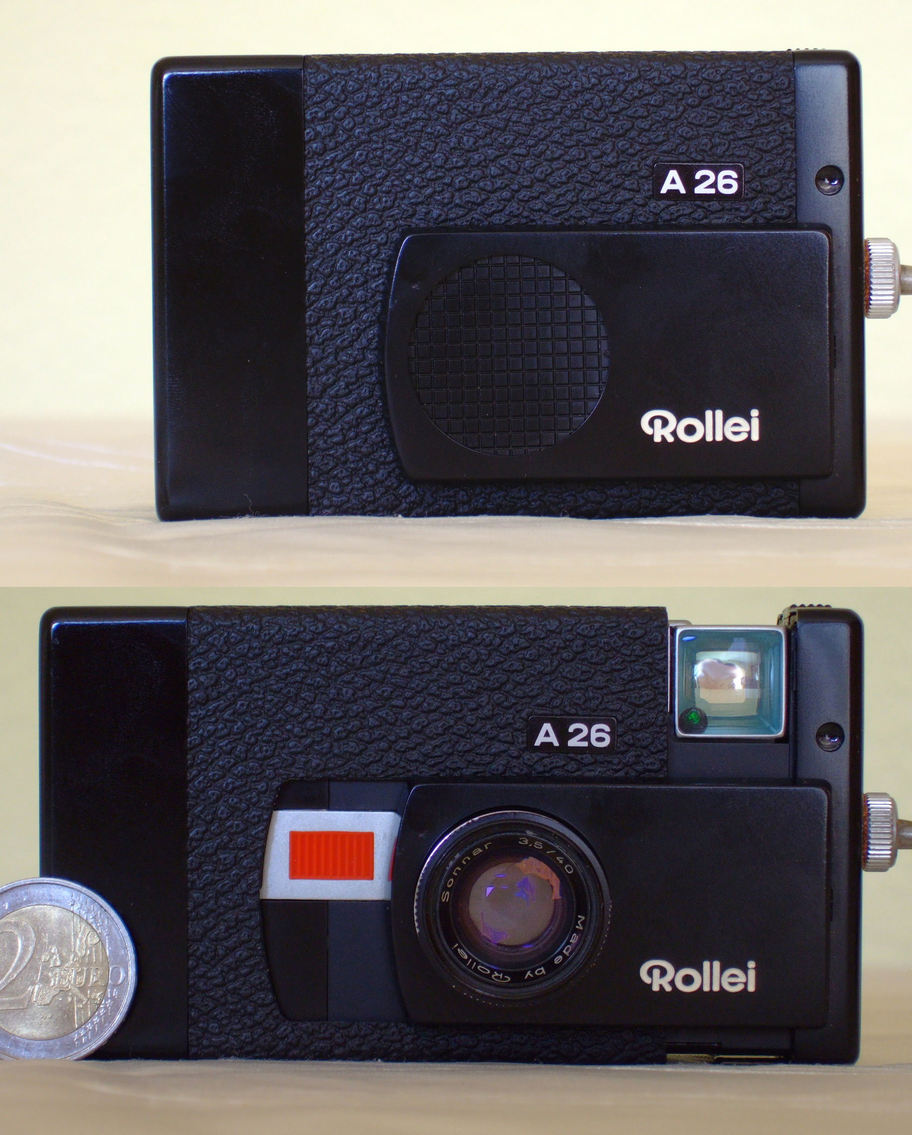 Die Pocketfilm-Kamera Rollei A26 im geschlossenen (oben) und geöffneten (unten) Zustand